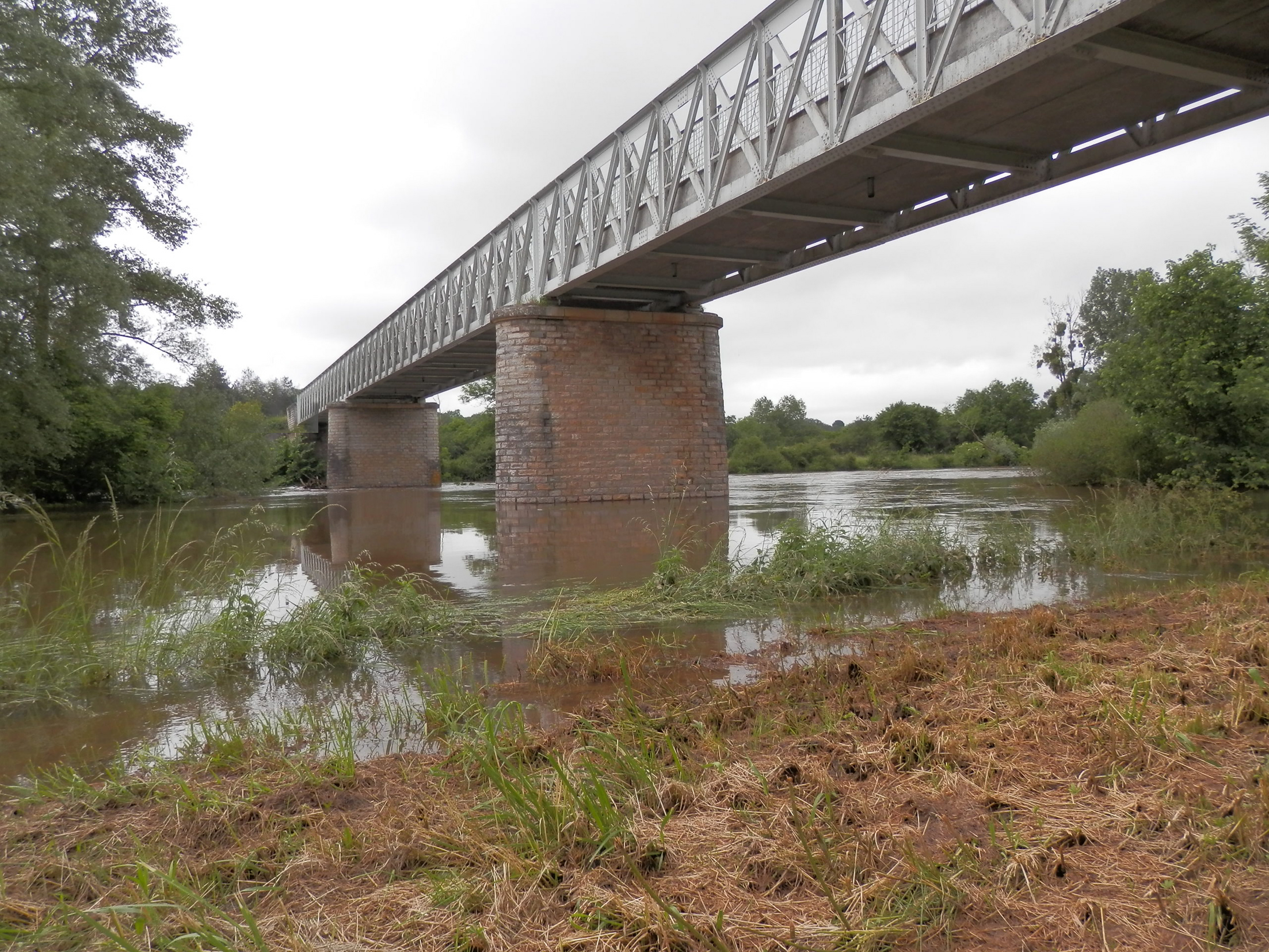 Pont de la D97 sur le Cher entre Drevant et La Groutte. Pont métallique inauguré en 1898